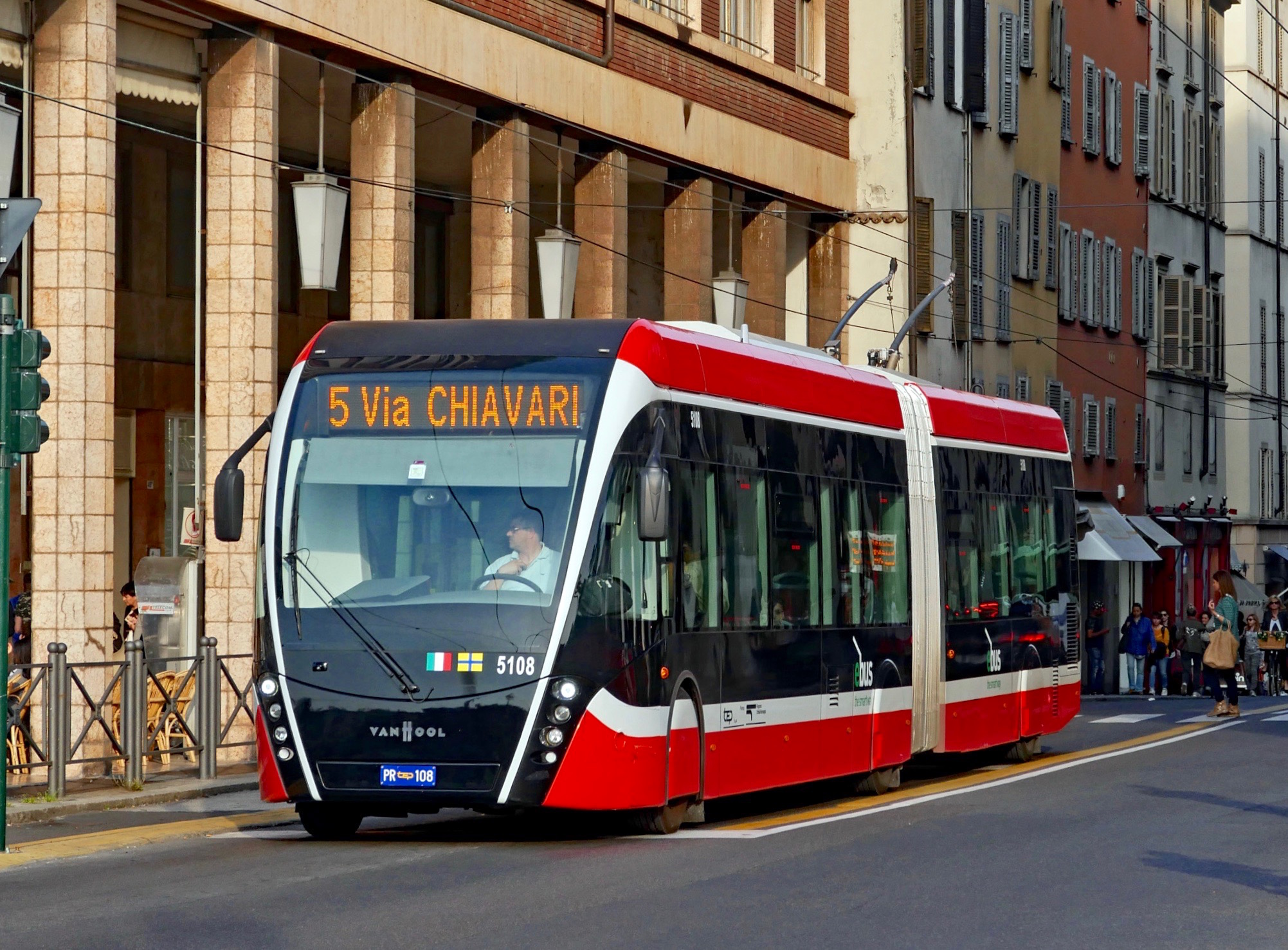 Trolleybus Exquicity du réseau de Parme, en Italie